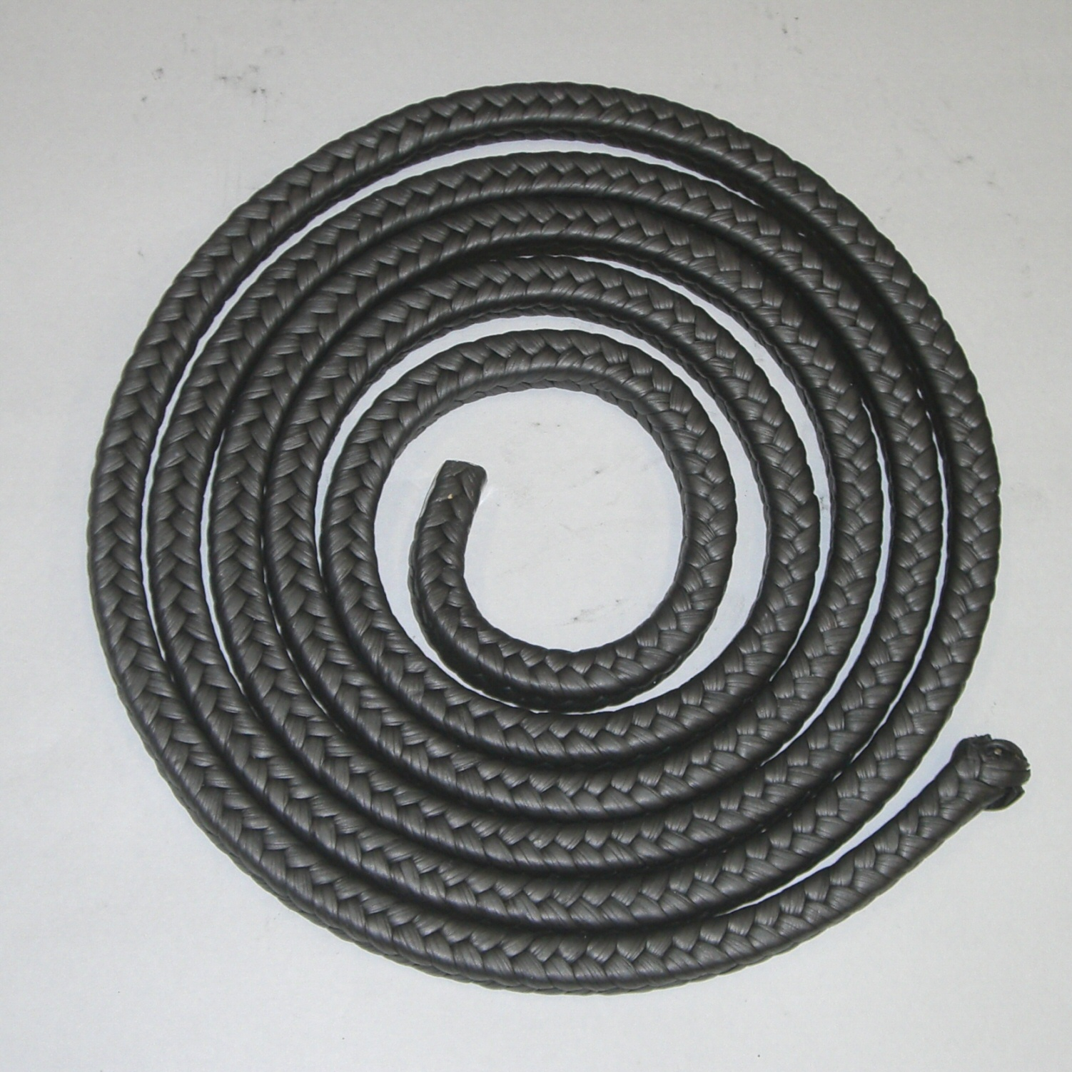 (Seal_(mechanical)); シール (シール (工学))グランドパッキン